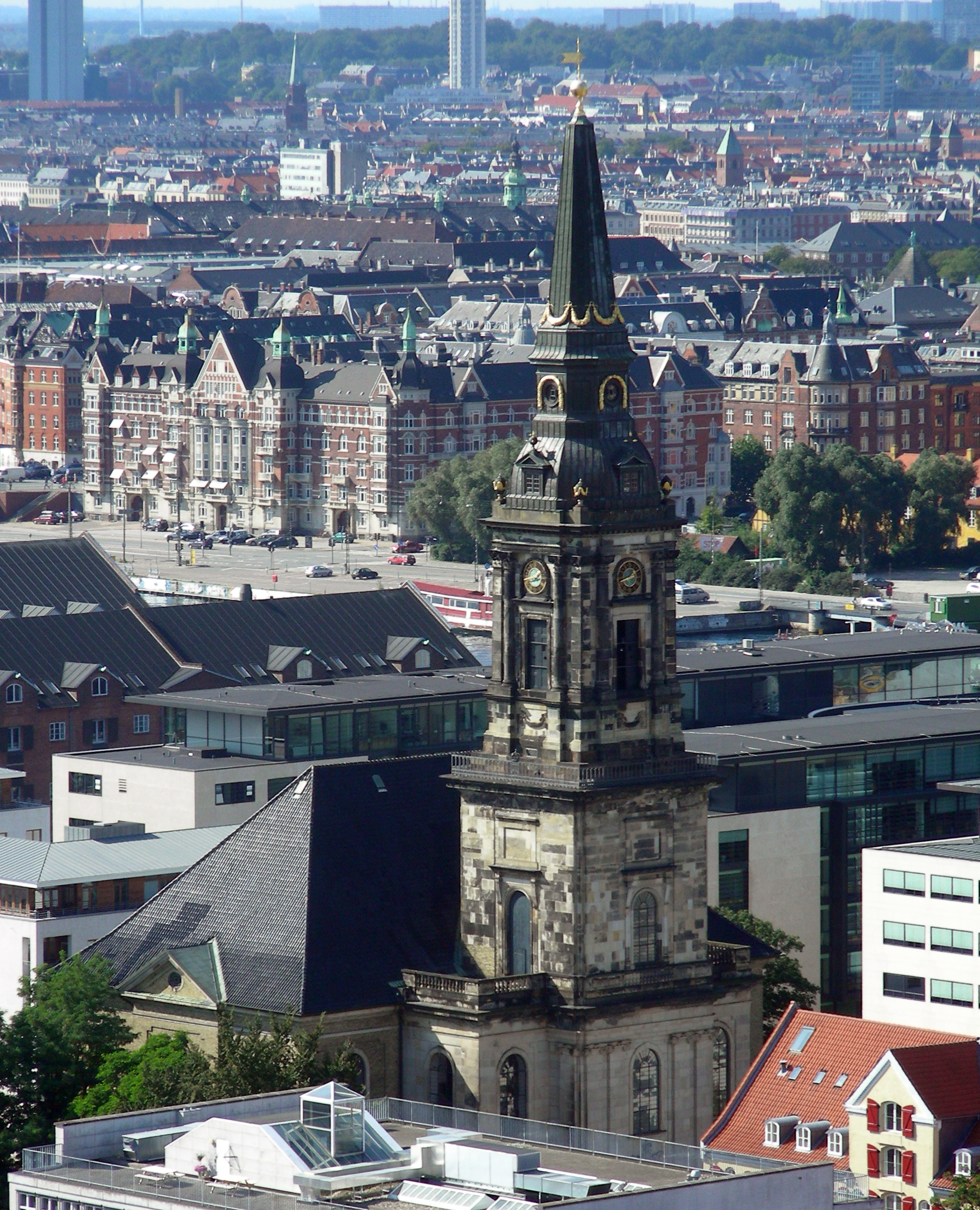 Christians Kirke, Copenhagen, Denmark. Seen from the steeple on Vor Frelsers Kirke.